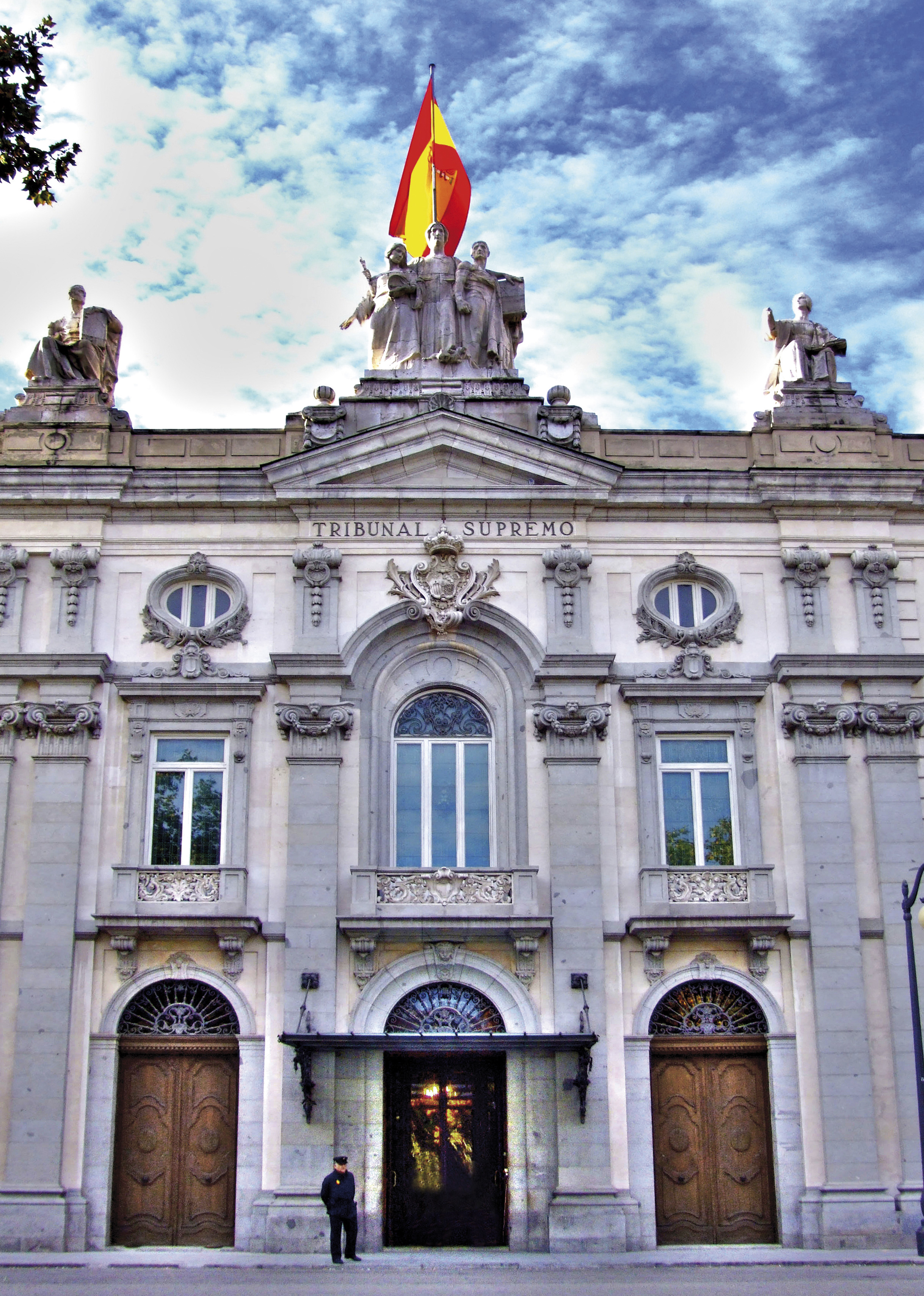 Puerta principal del Tribunal Supremo del Reino de España, en la Plaza de la Villa de París, s/n, en Madrid.